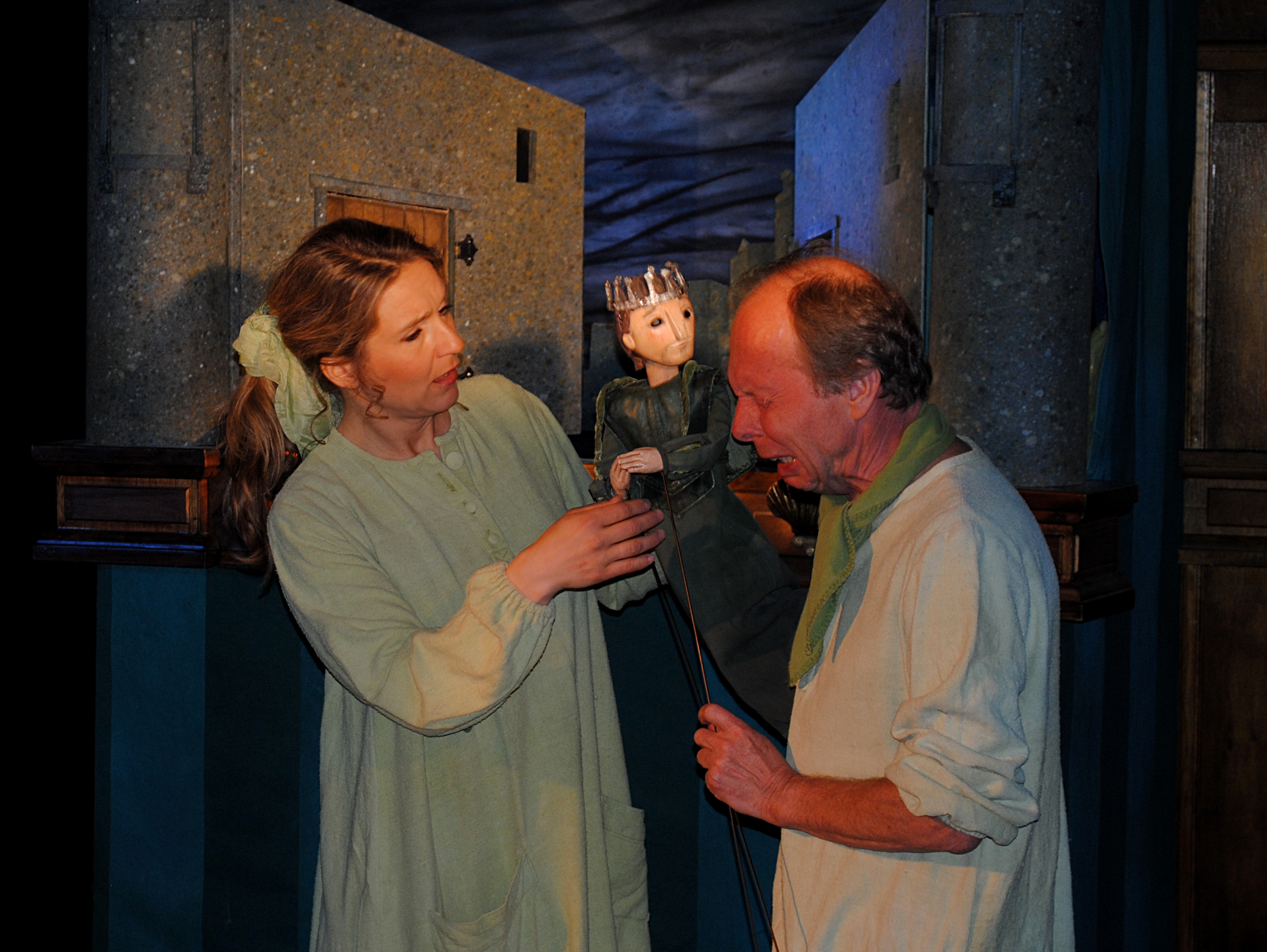 Agder teaters forestilling "Prinsessen på erten" i Den kulturelle skolesekken 2013.